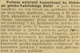 Згадка про с. Вівся у польські довоєнній газеті, 1937 р.